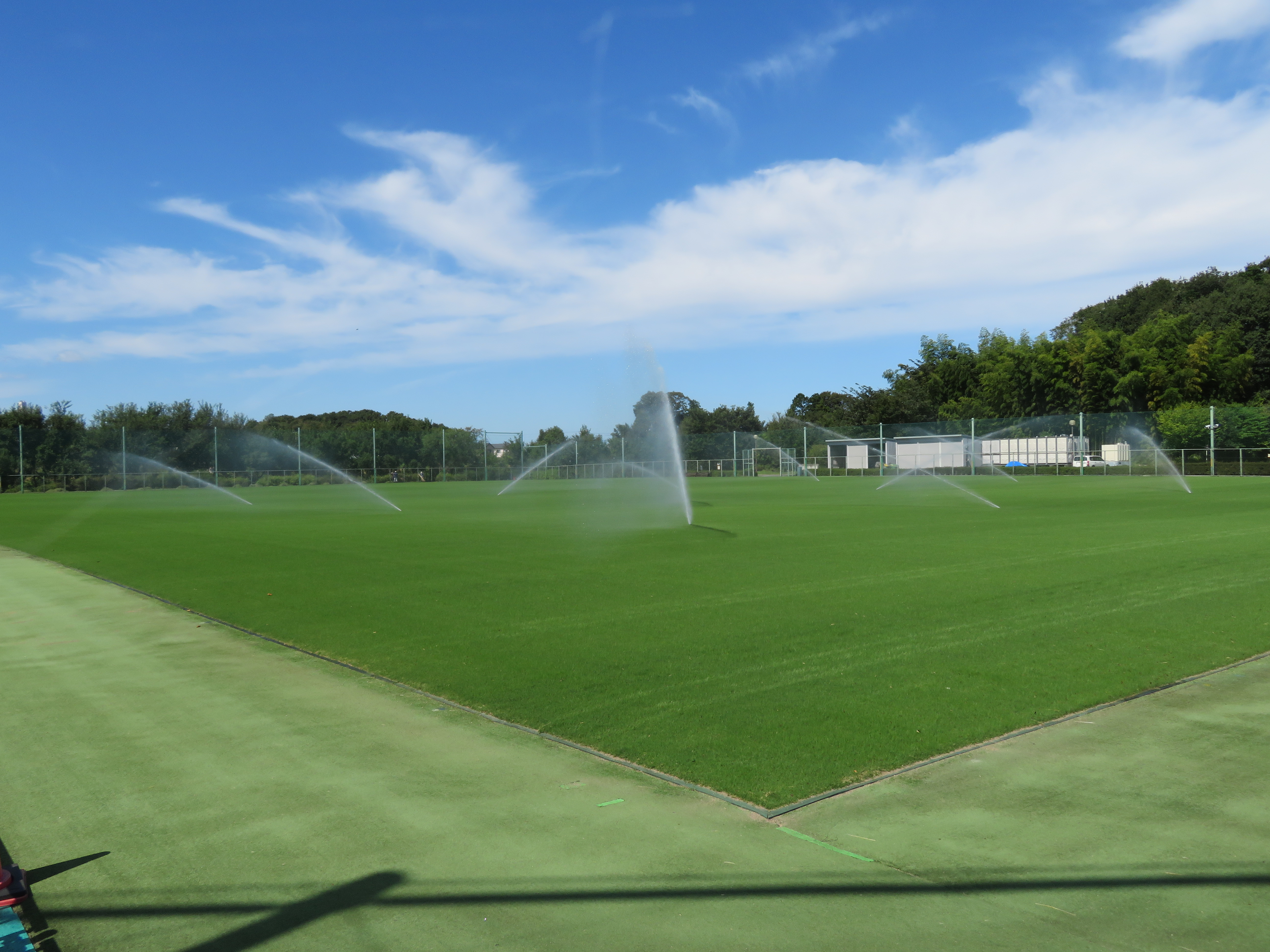 さいたま市西区に所在する秋葉の森総合公園サッカー場（場内） Canon PowerShot SX720 HS